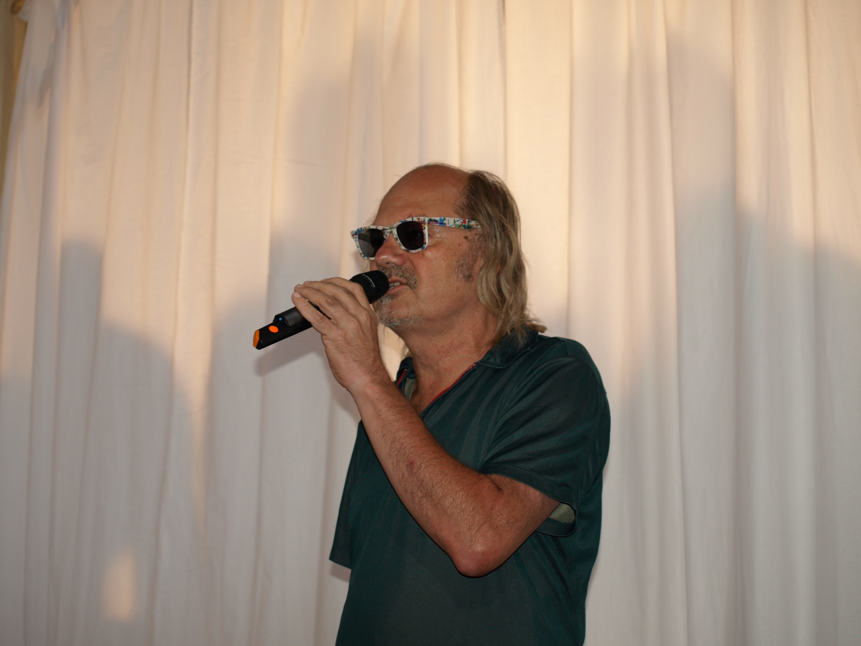 Fotky z novinářské konference z 24.7.2014- - Autor Blanka Borová pro & 10Mpix.cz